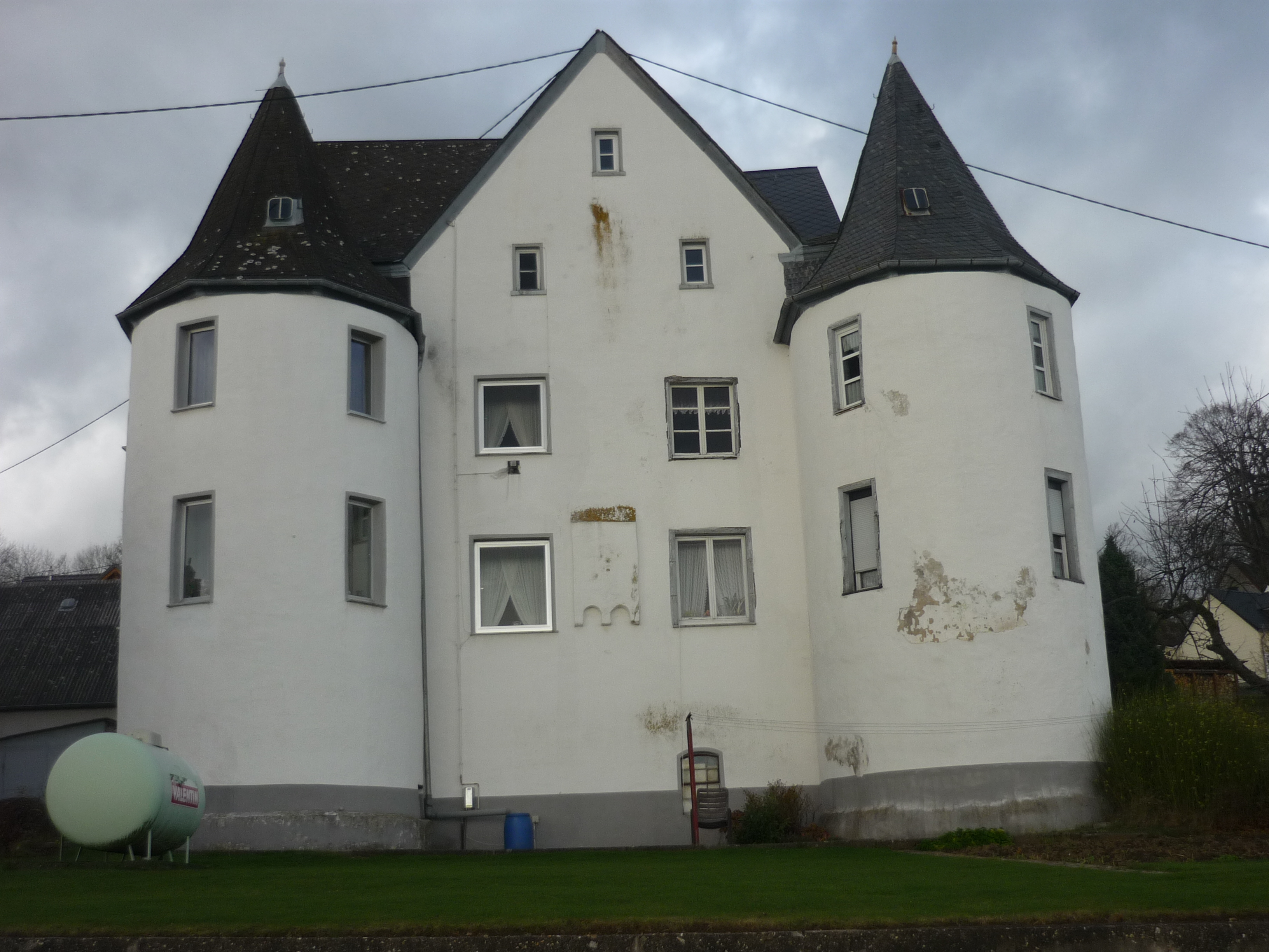 Reifernberger Schlösschen Weltersburg be Westerburg